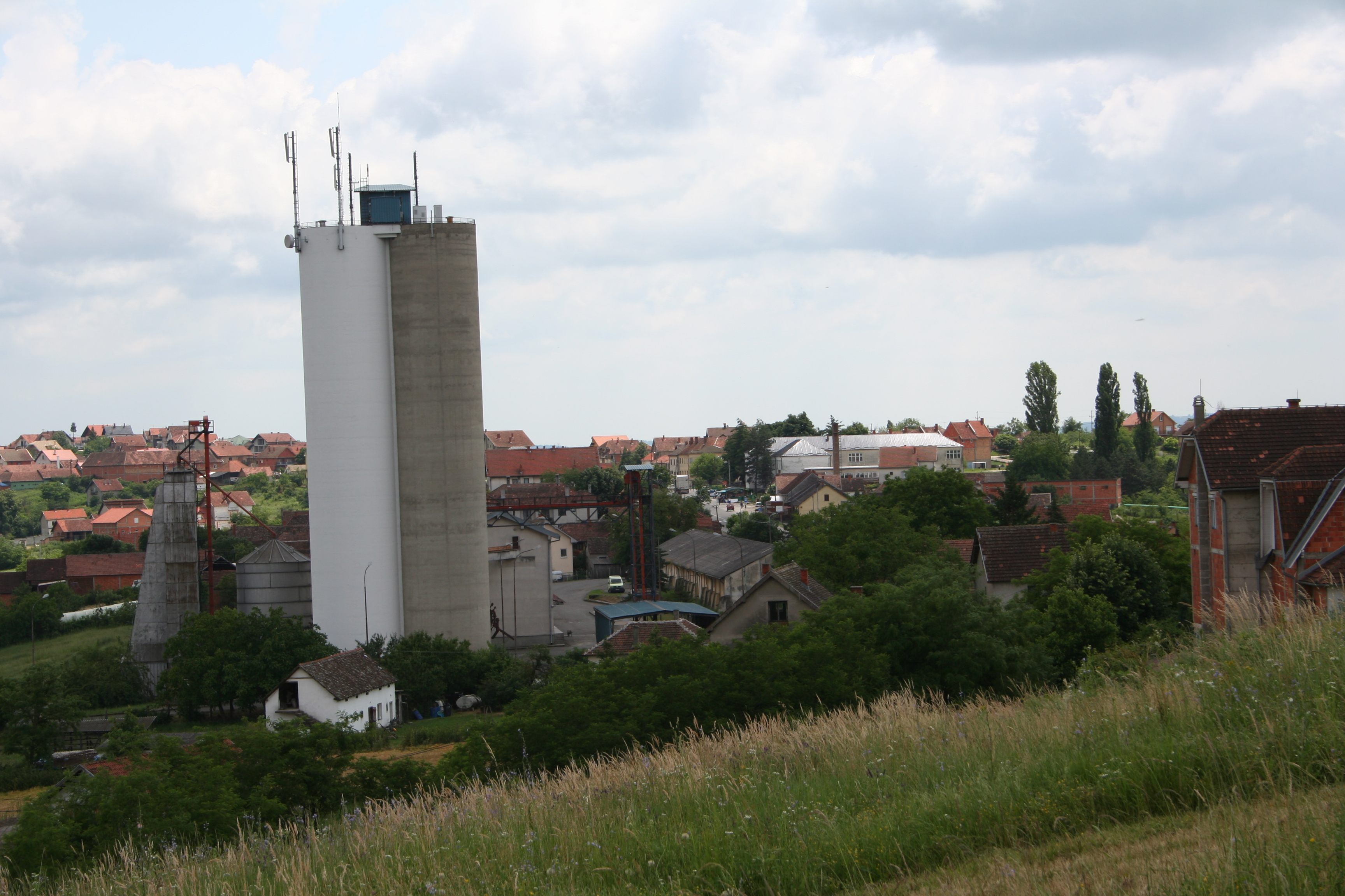 Panorama Draginja, opština Koceljeva